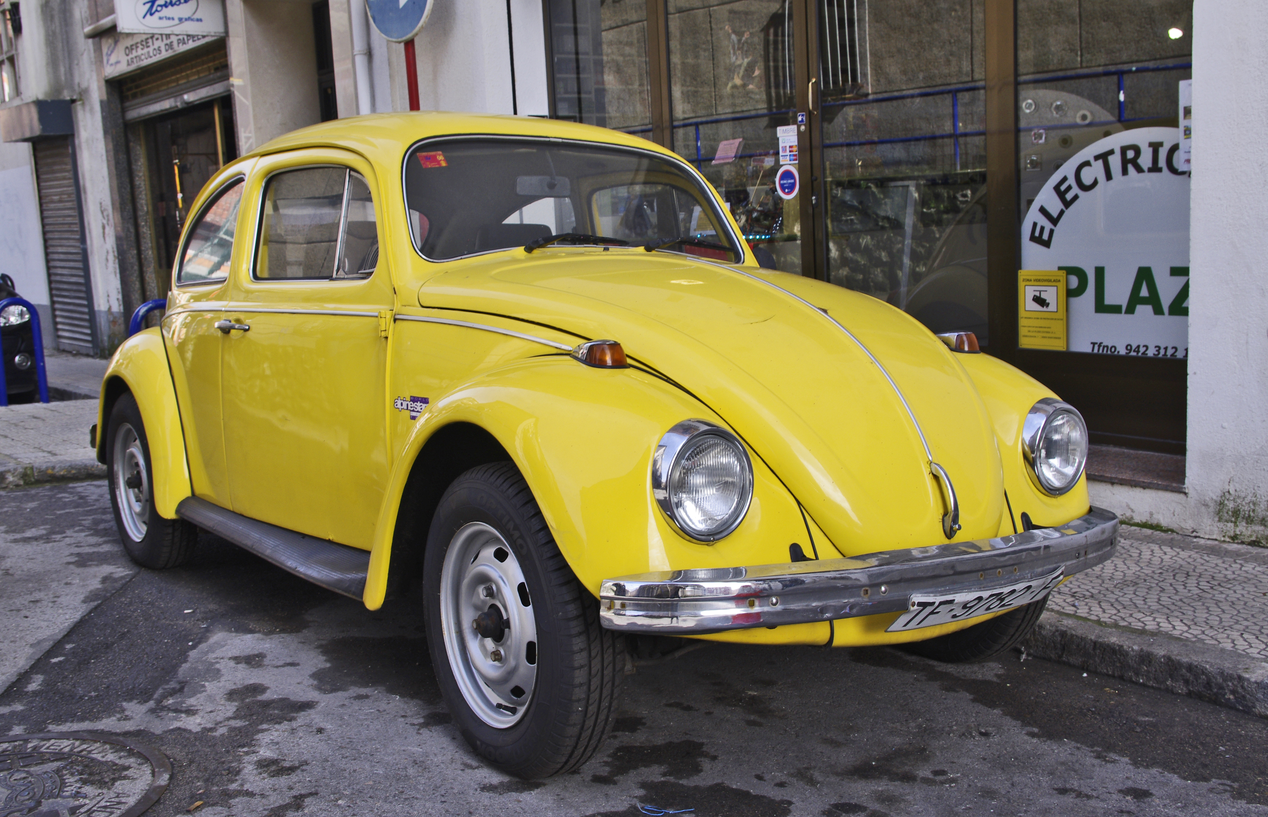 1976 Volkswagen 1300 L 'Escarabajo' [Typ 1]